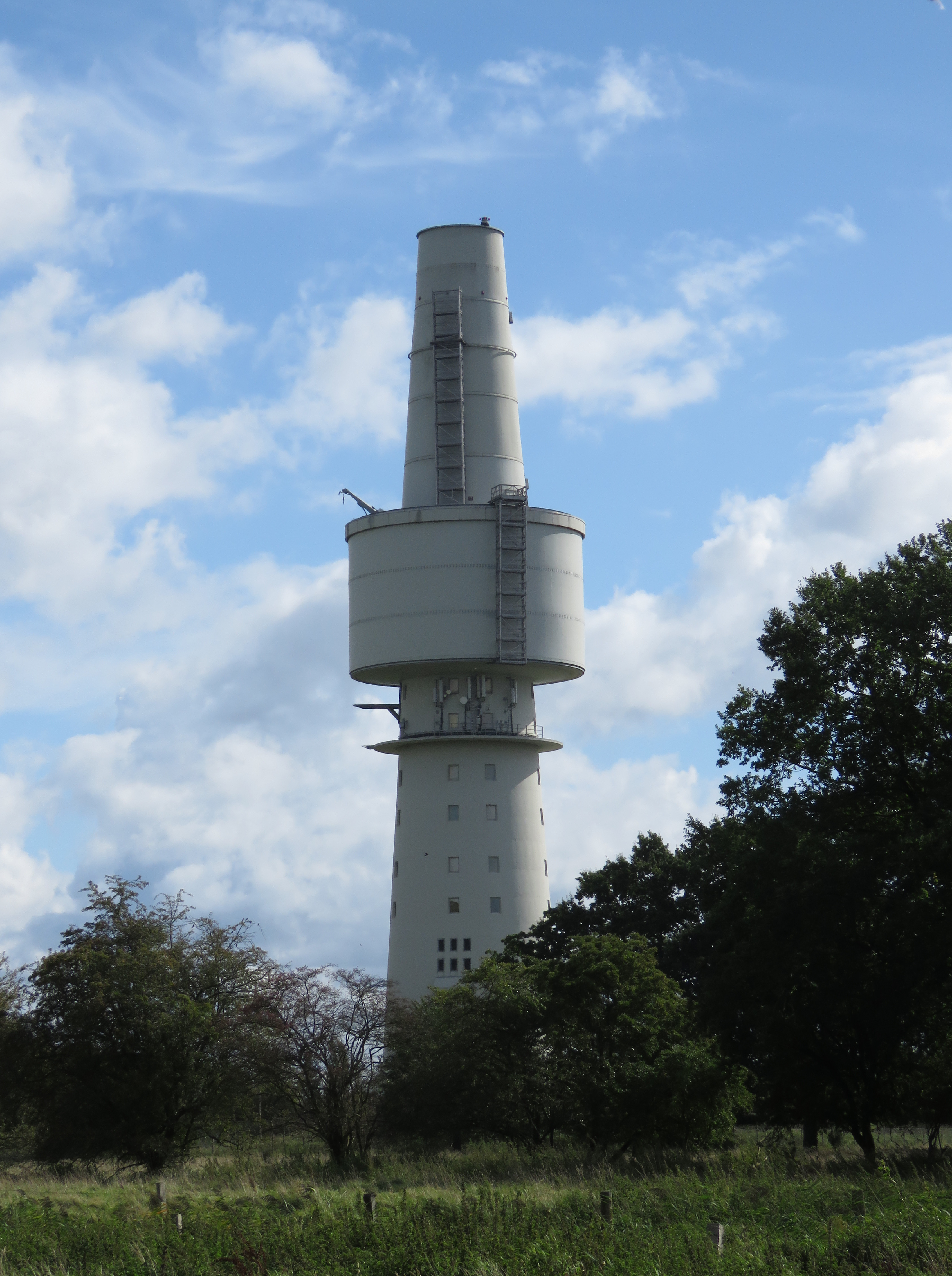 Aussenansicht Marinehorchturm M Pelzerhaken